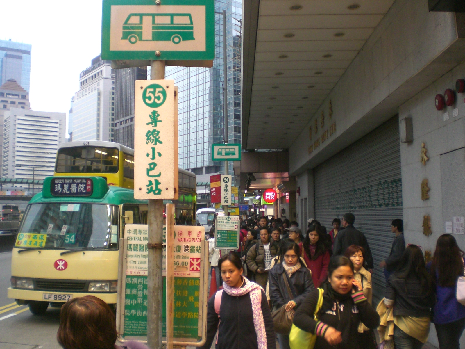 香港島綠色專線小巴 干諾道中